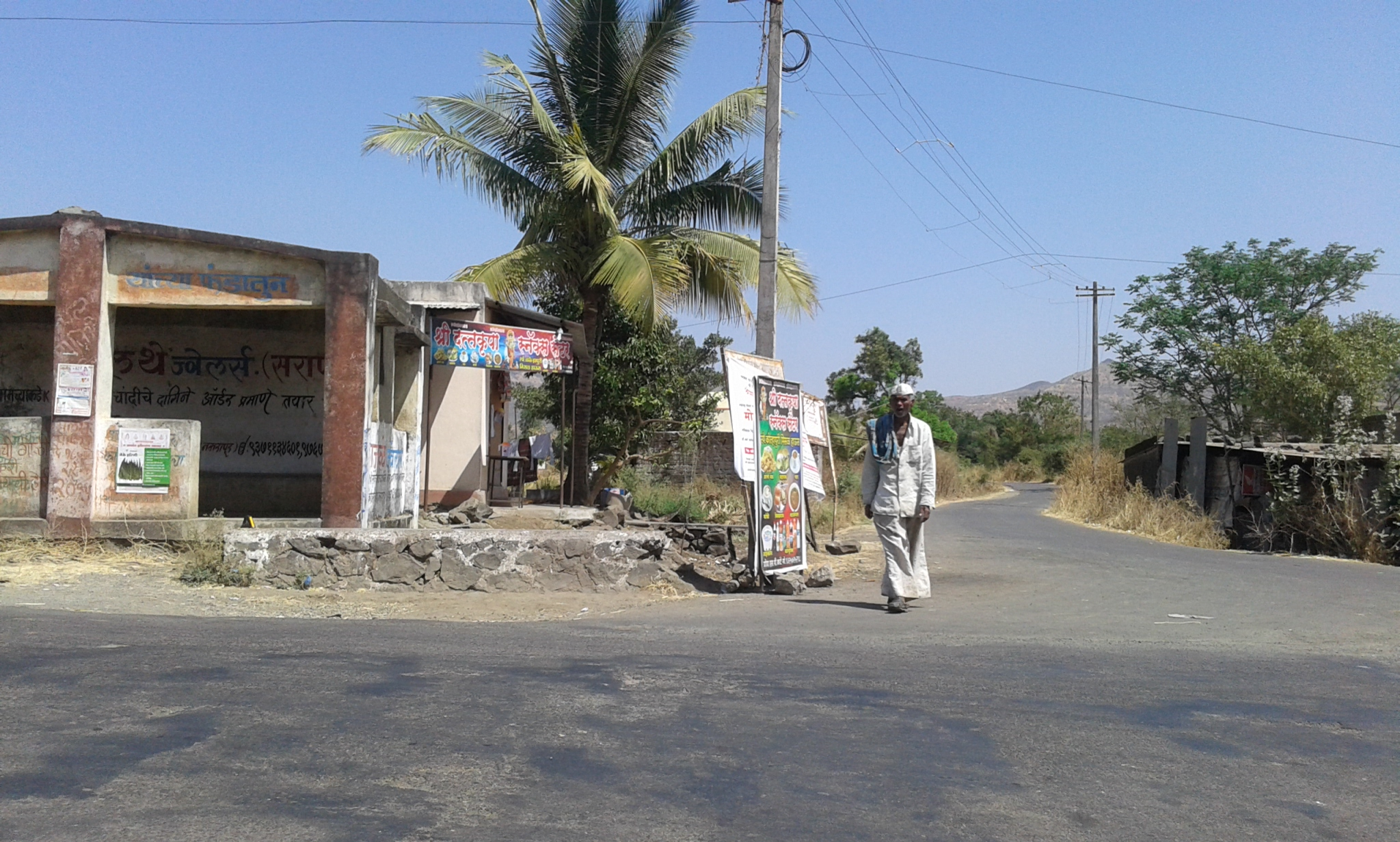 कुरंगवडी बस स्थानक